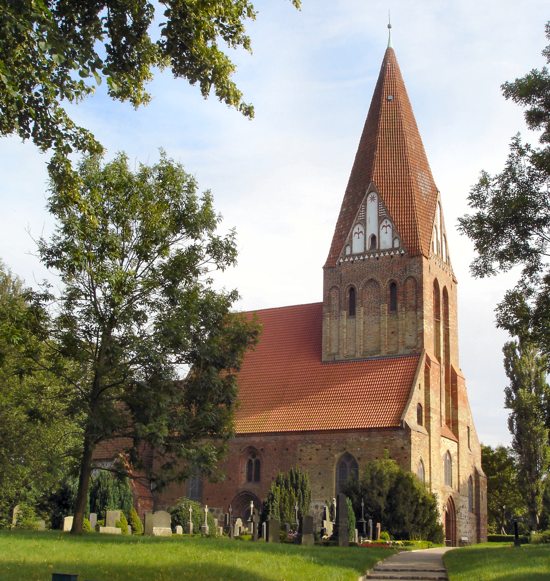 Kirche in Bartenshagen-Parkentin / Church in Bartenshagen-Parkentin